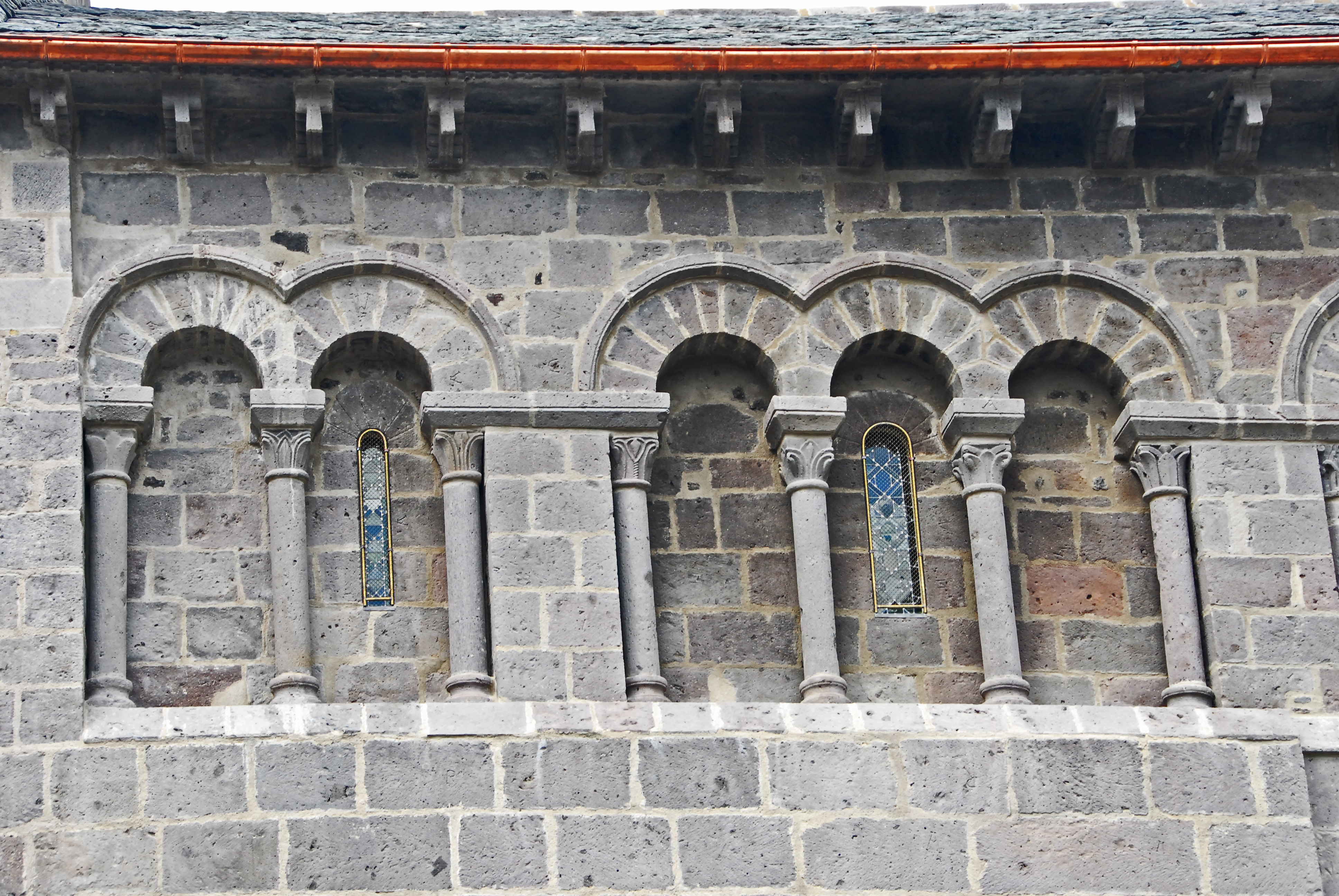 N.-D.d'Orcival, Blendarkatur Obergeschoss, von S